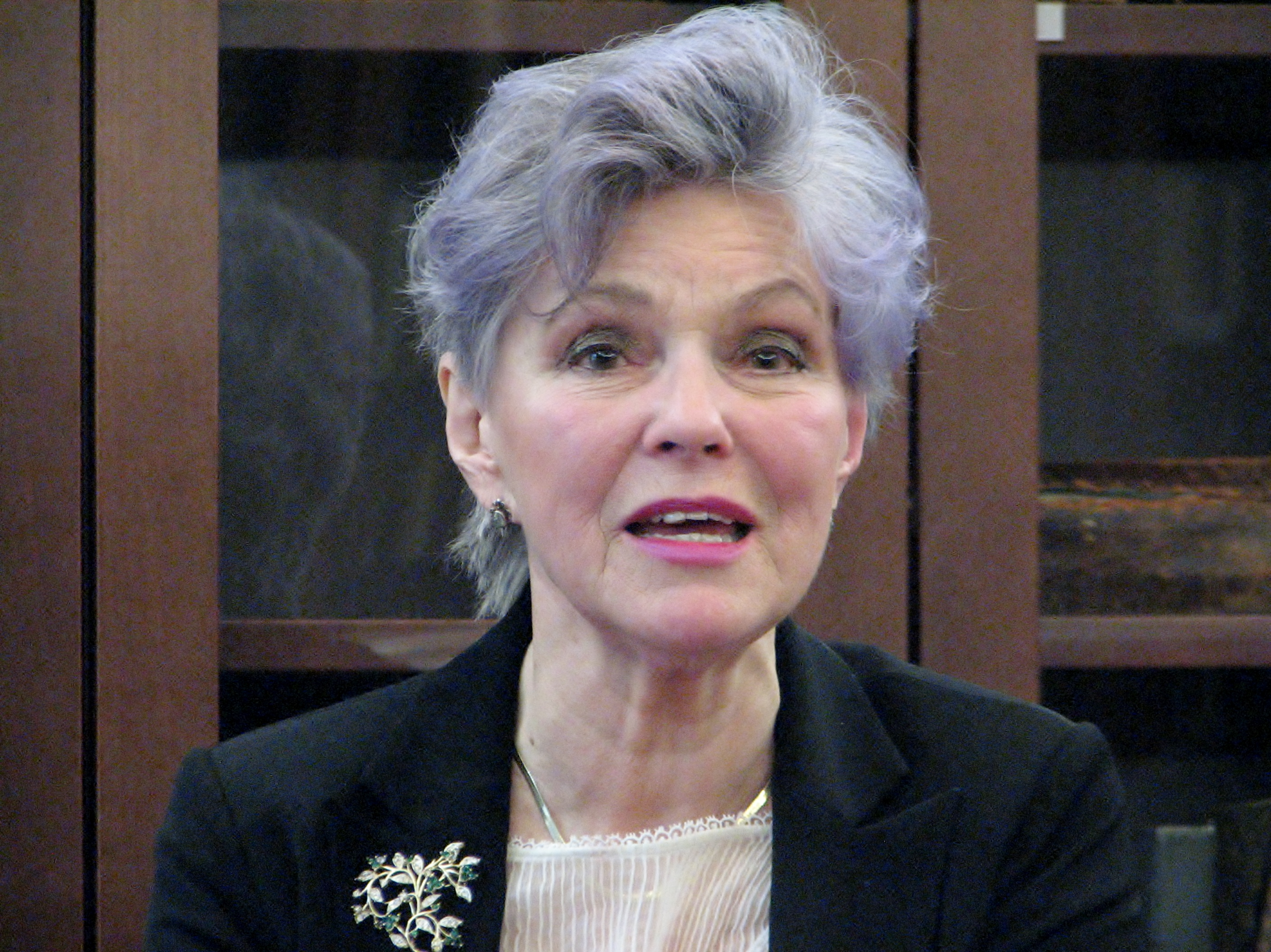 Liina Orlova esinemas rahvusvahelise luulepäeva luulemaratonil Tallinna Keskraamatukogus 21. märtsil 2014